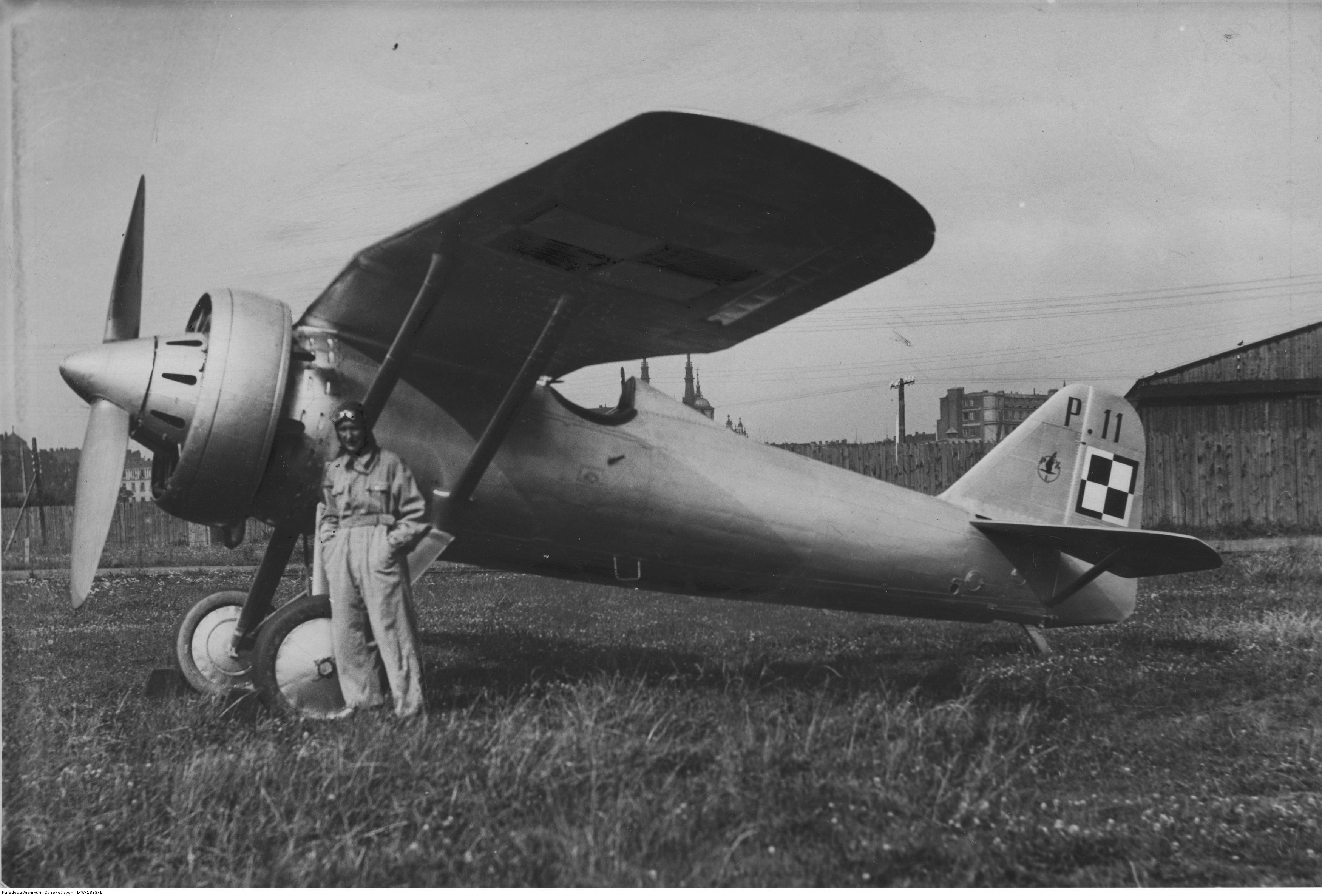 Wizyta polskich lotników w Stanach Zjednoczonych; wrzesień 1932 r. Płk Jerzy Kossowski przed samolotem PZL P.11. Koncern Ilustrowany Kurier Codzienny - Archiwum Ilustracji. Sygnatura: 1-W-1833-1